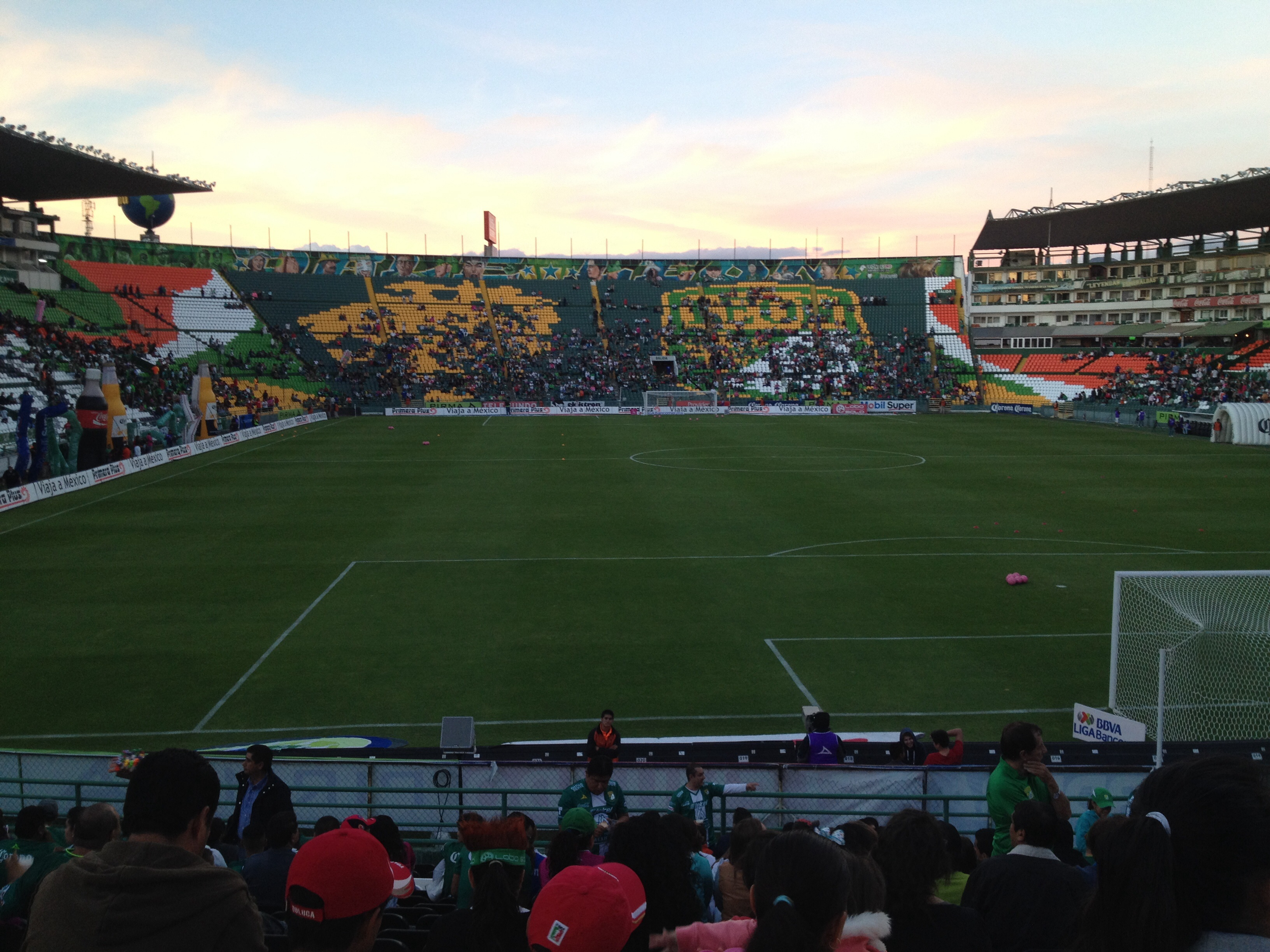 Estadio León (Nou Camp), León, Guanajuato, México [Imagen Actual]